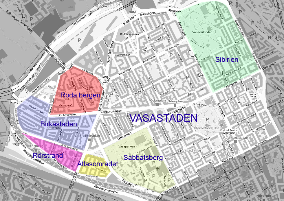 Vasastaden